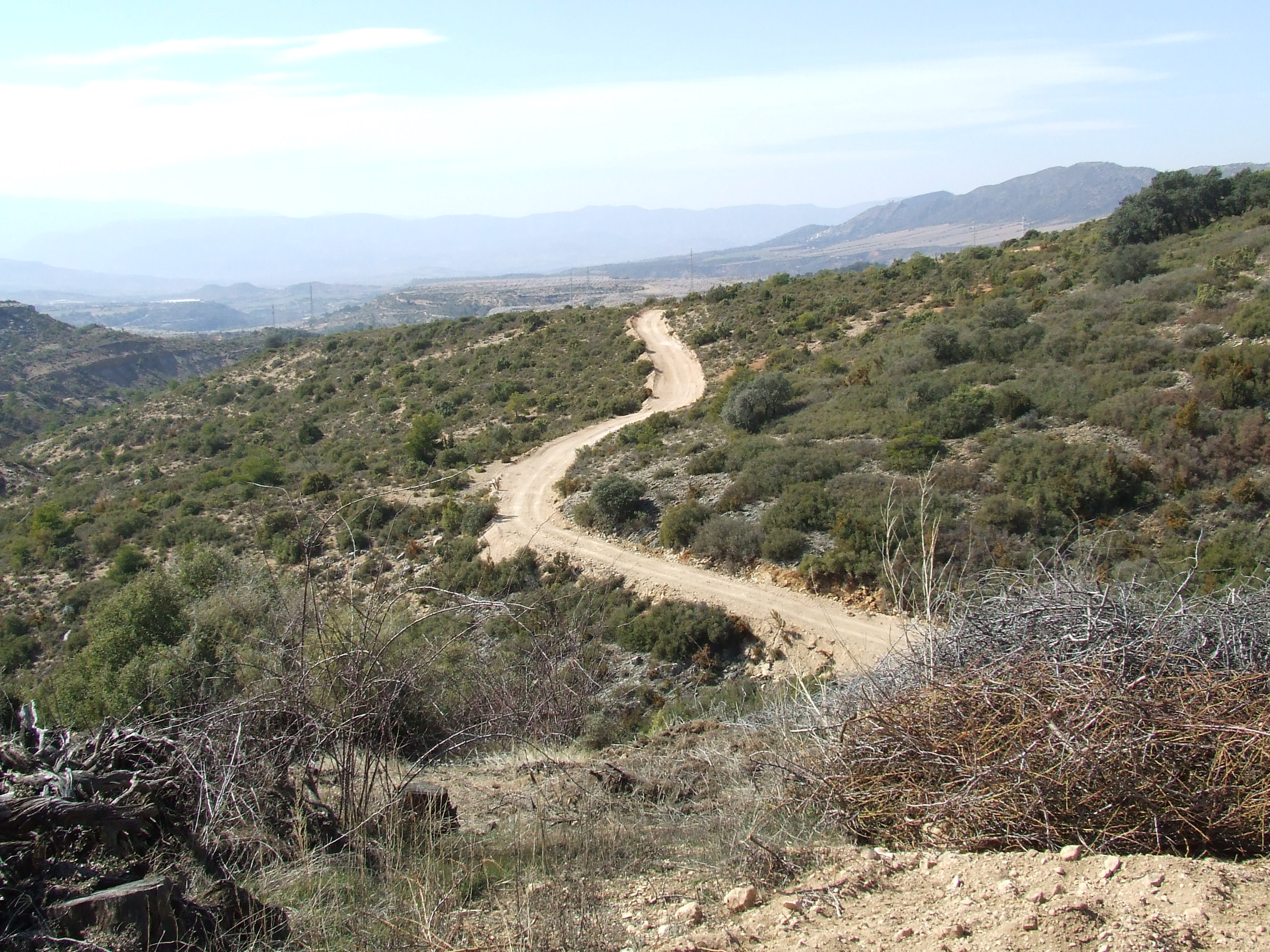 El Camí dels Planells (Abella de la Conca, Pallars Jussà)